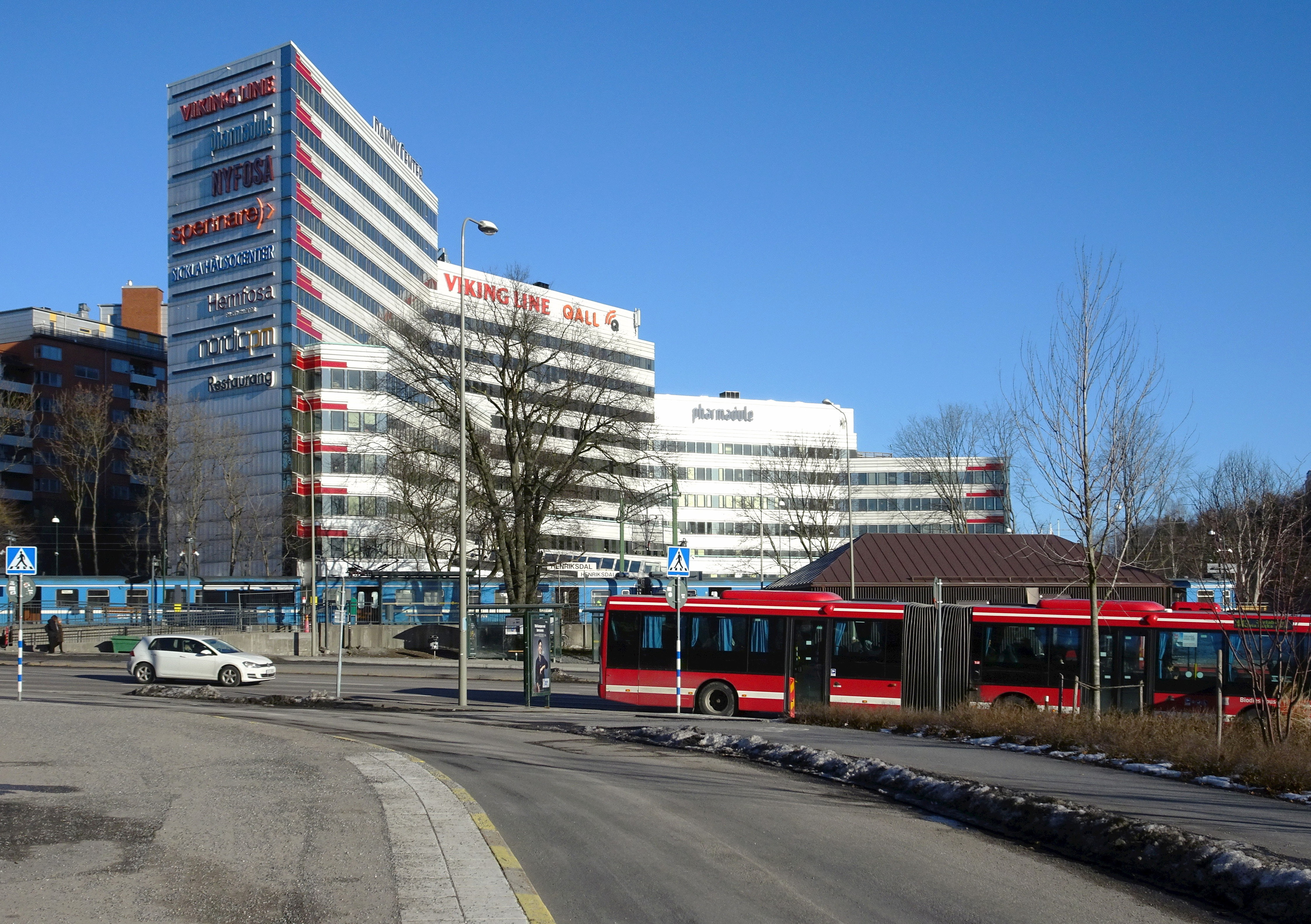 DanvikCenter